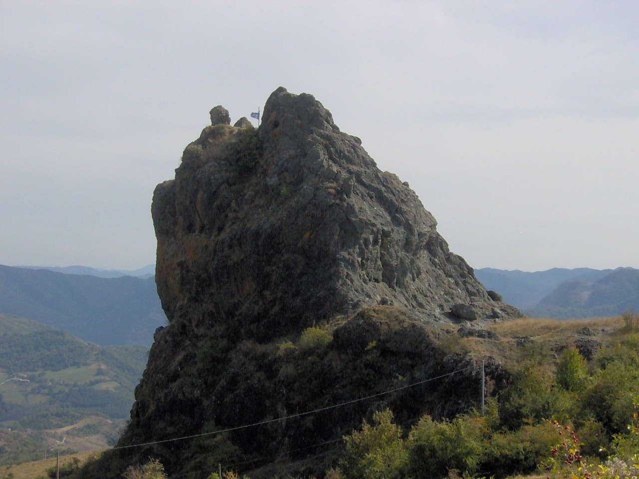 Sasso di San Zenobi, Appennino settentrionale